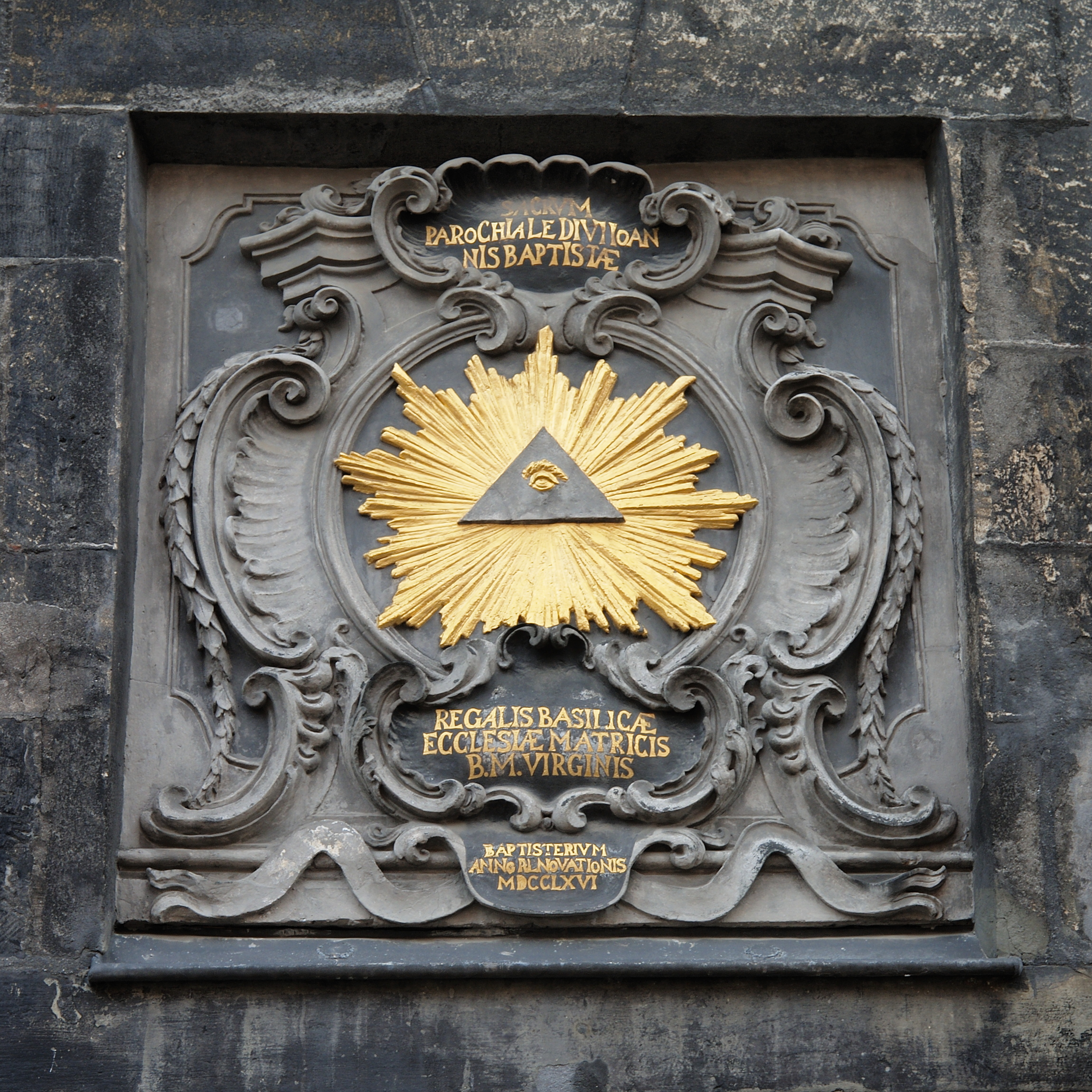 Auge Gottes am Eingangsgebäude zu Domhof des Aachener Doms in Aachen, Denkmal